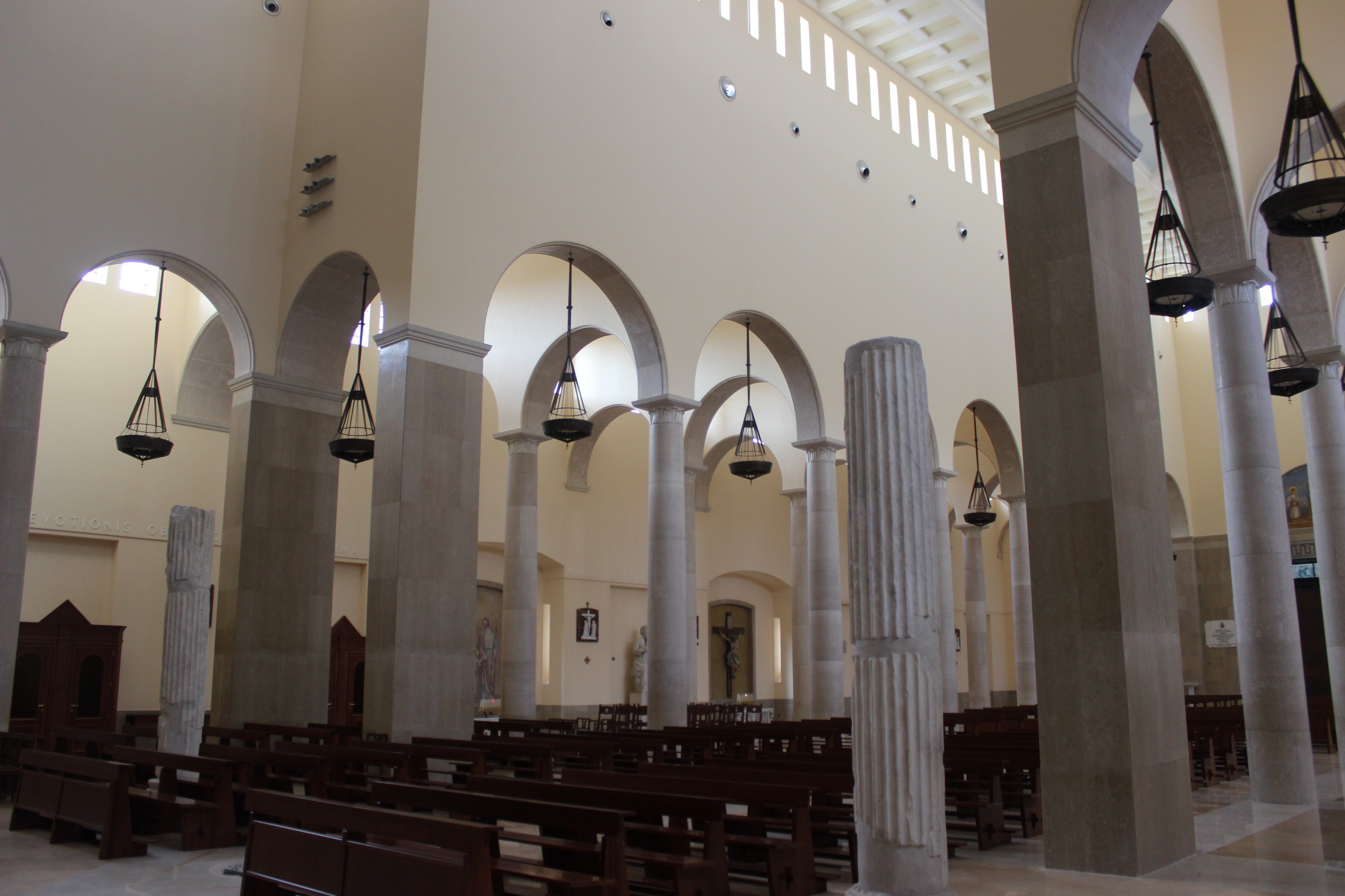 Catedral de Benevento